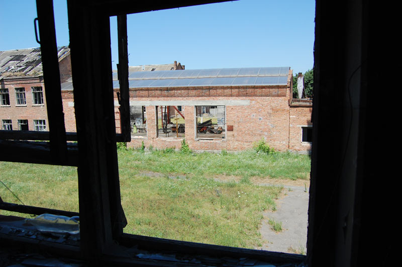 Школа № 1 г. Беслана, Северная Осетия. Вид из окна мастерских.